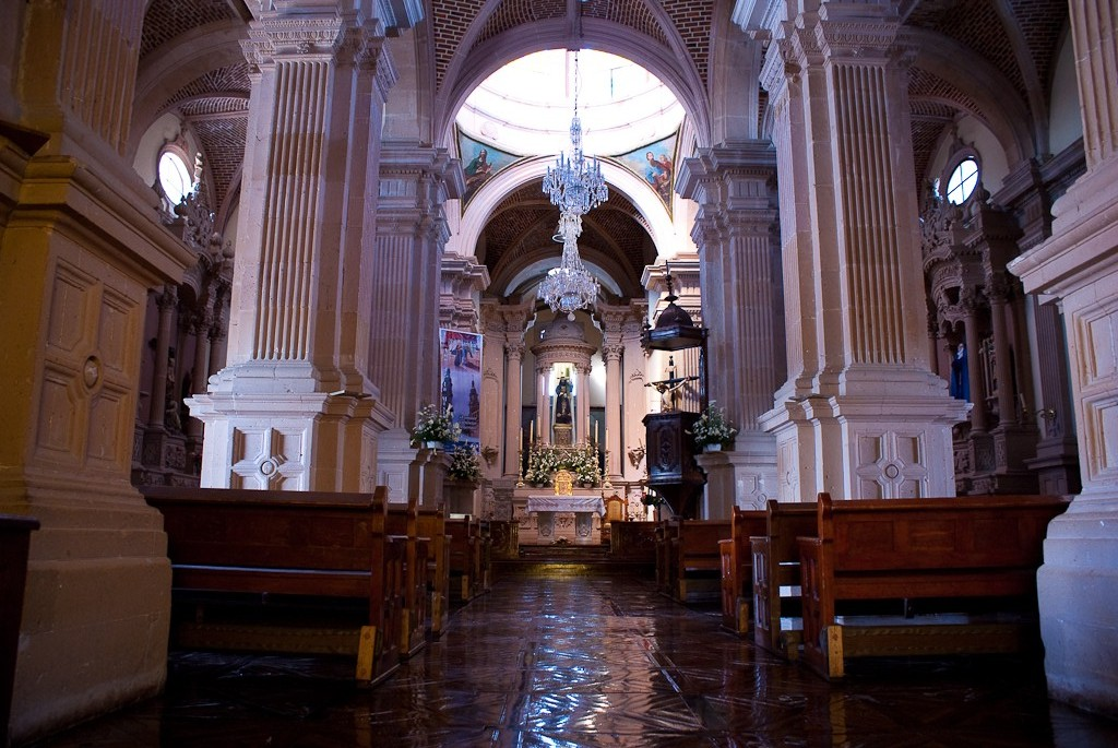 Interior Templo El Calvario, Lagos de Moreno